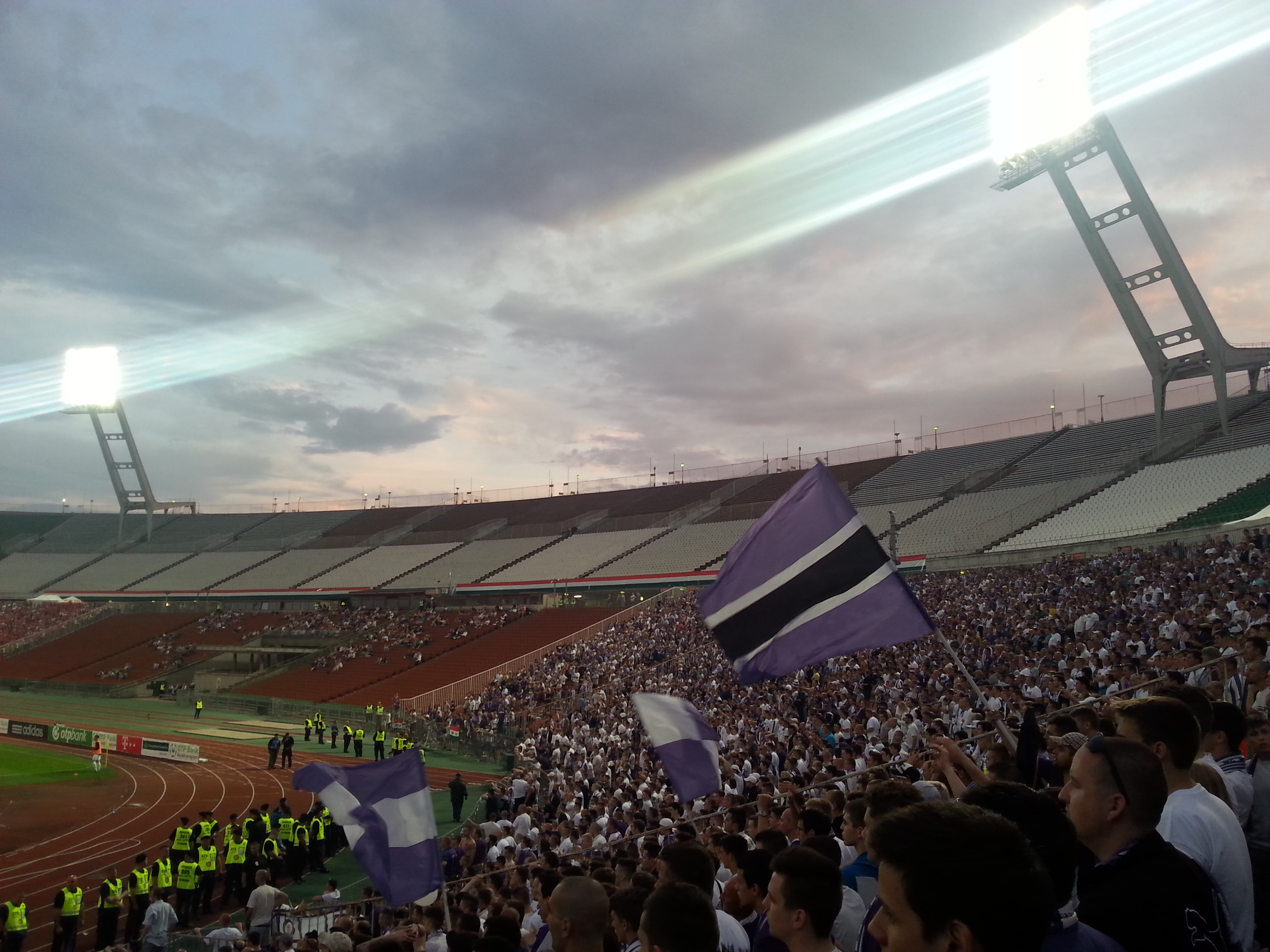 Magyar Kupa döntő4 2014.05.25 Újpest